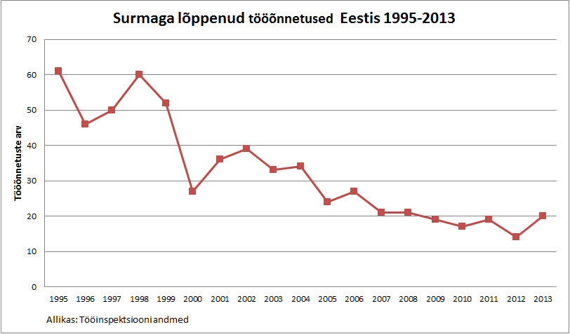 Surmaga lõppenud tööõnnetused Eestis 1995-2013